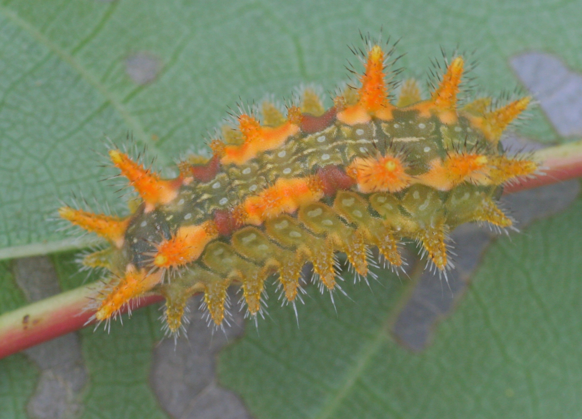 Euclea delphinii Spiny oak-slug larva on maple